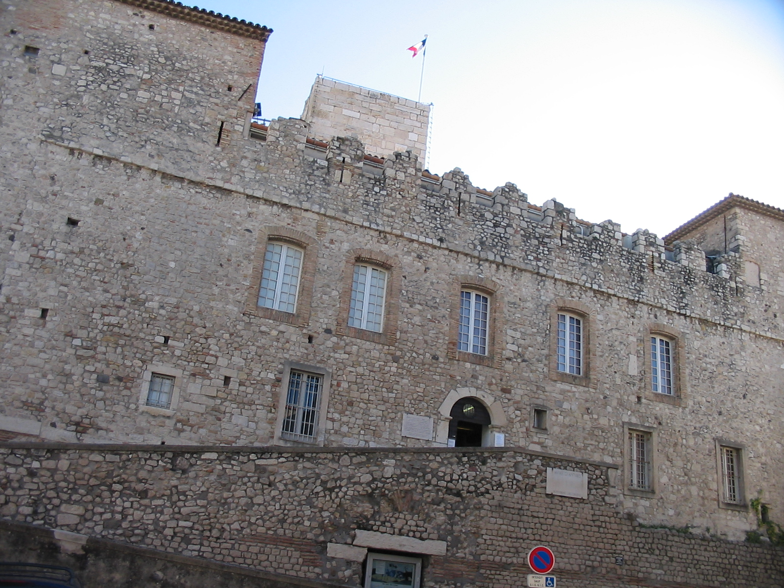 Musée Picasso d'Antibes (Alpes-Maritimes). Je suis l'auteur du cliché pris en janvier 2006